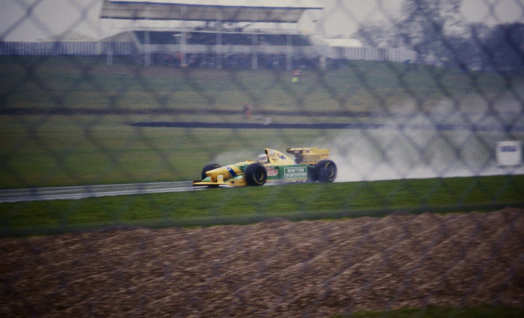 schumacher 1991 benetton